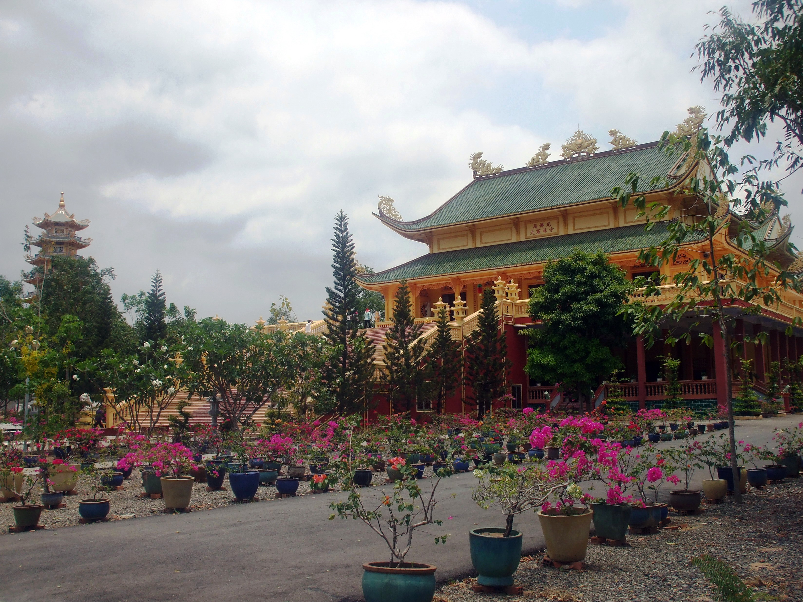 Vạn Phật Quang Đại Tòng Lâm Tự ở Bà Rịa-VũngTàu (Việt Nam).